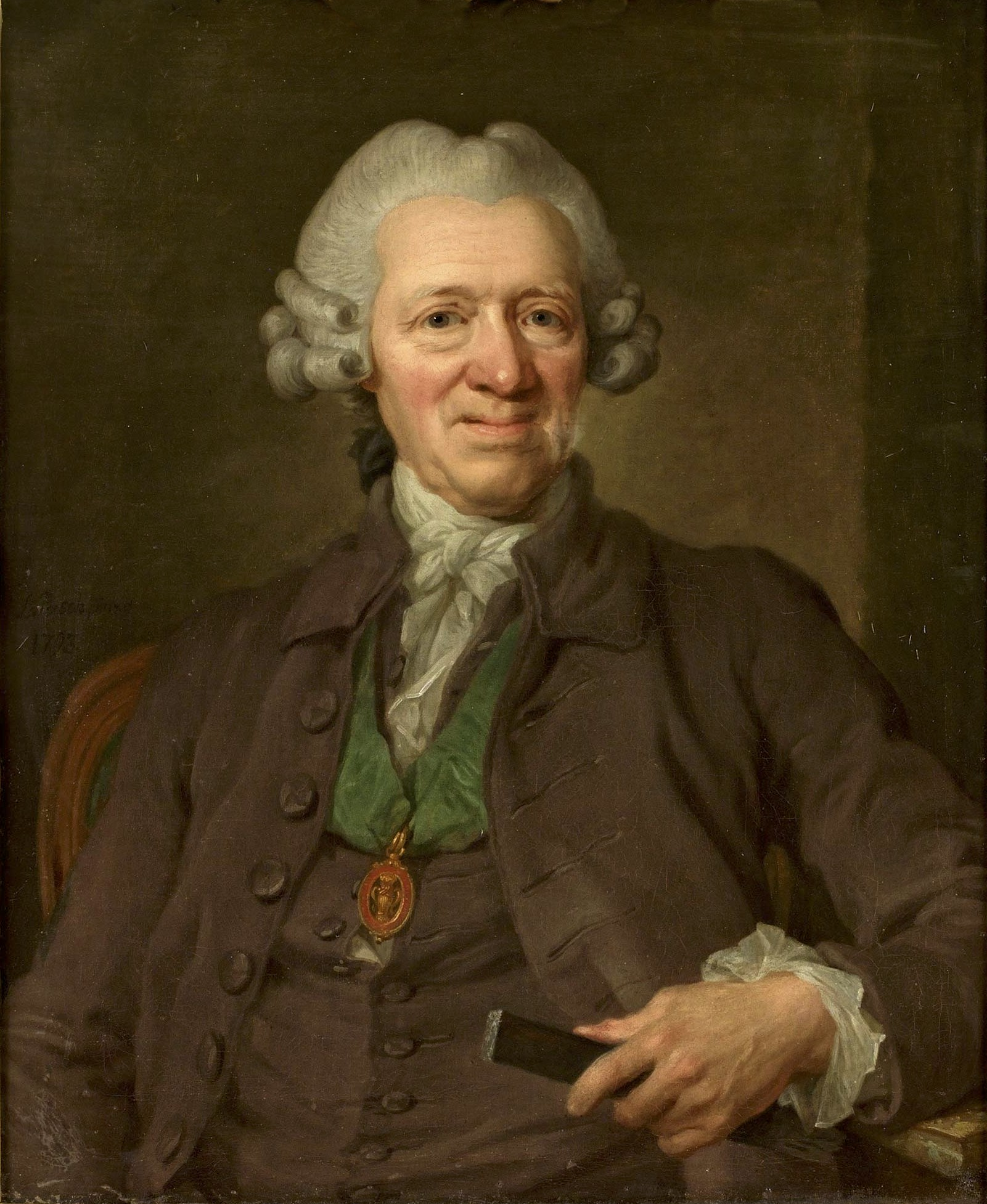 Porträtt föreställande Jacob Ramsell (1720‑1804) med Kungl. Vasaordens kommendörstecken runt halsen. Signerad och daterad L: Pasch pinxit 1793. Olja på duk, 76,5 cm x 63 cm. Med påskrift a tergo: ”Jacob Ramsell ägare af Ferna och Bockhammars Bruk”.